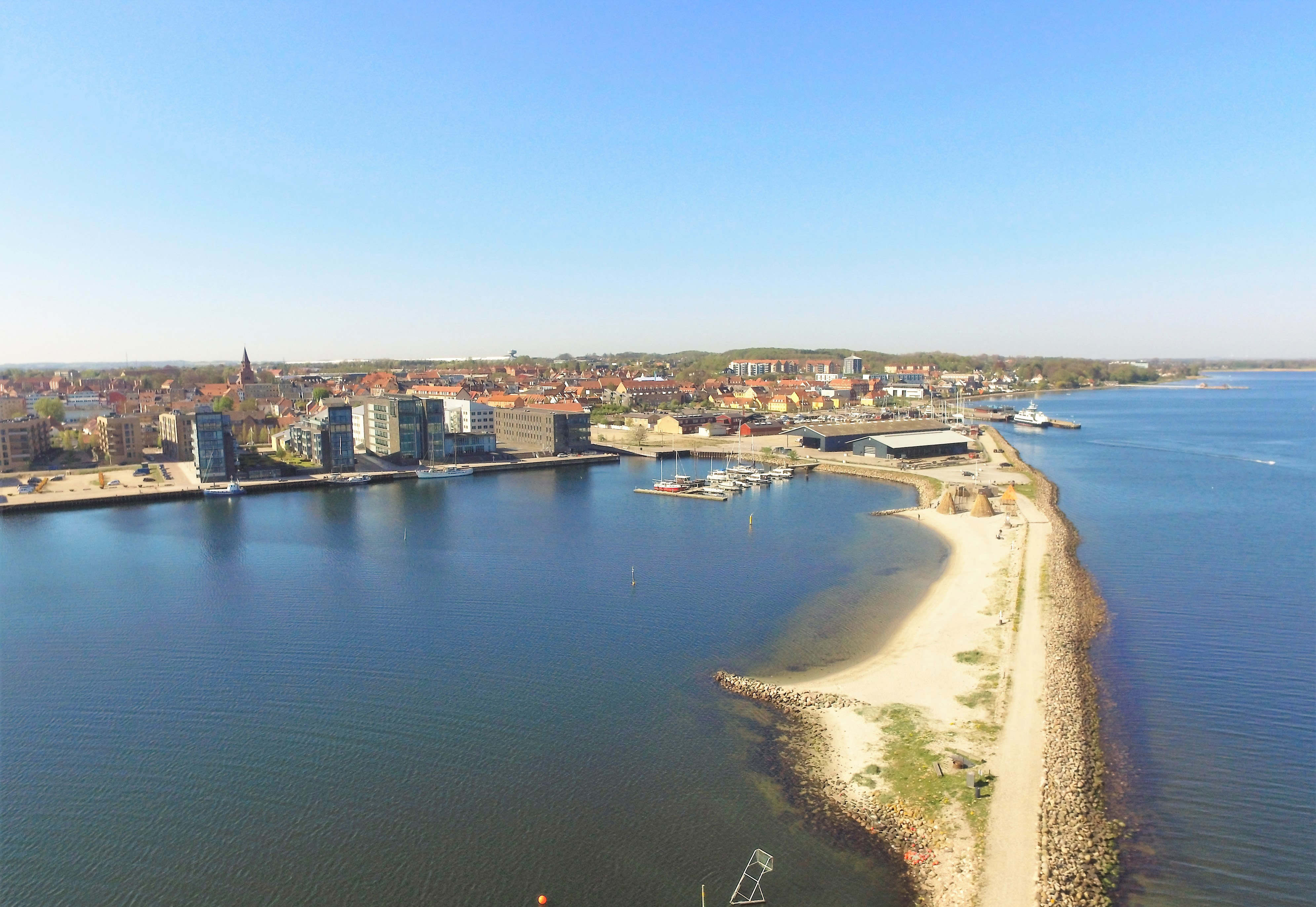 Drone foto fra freesky.dk